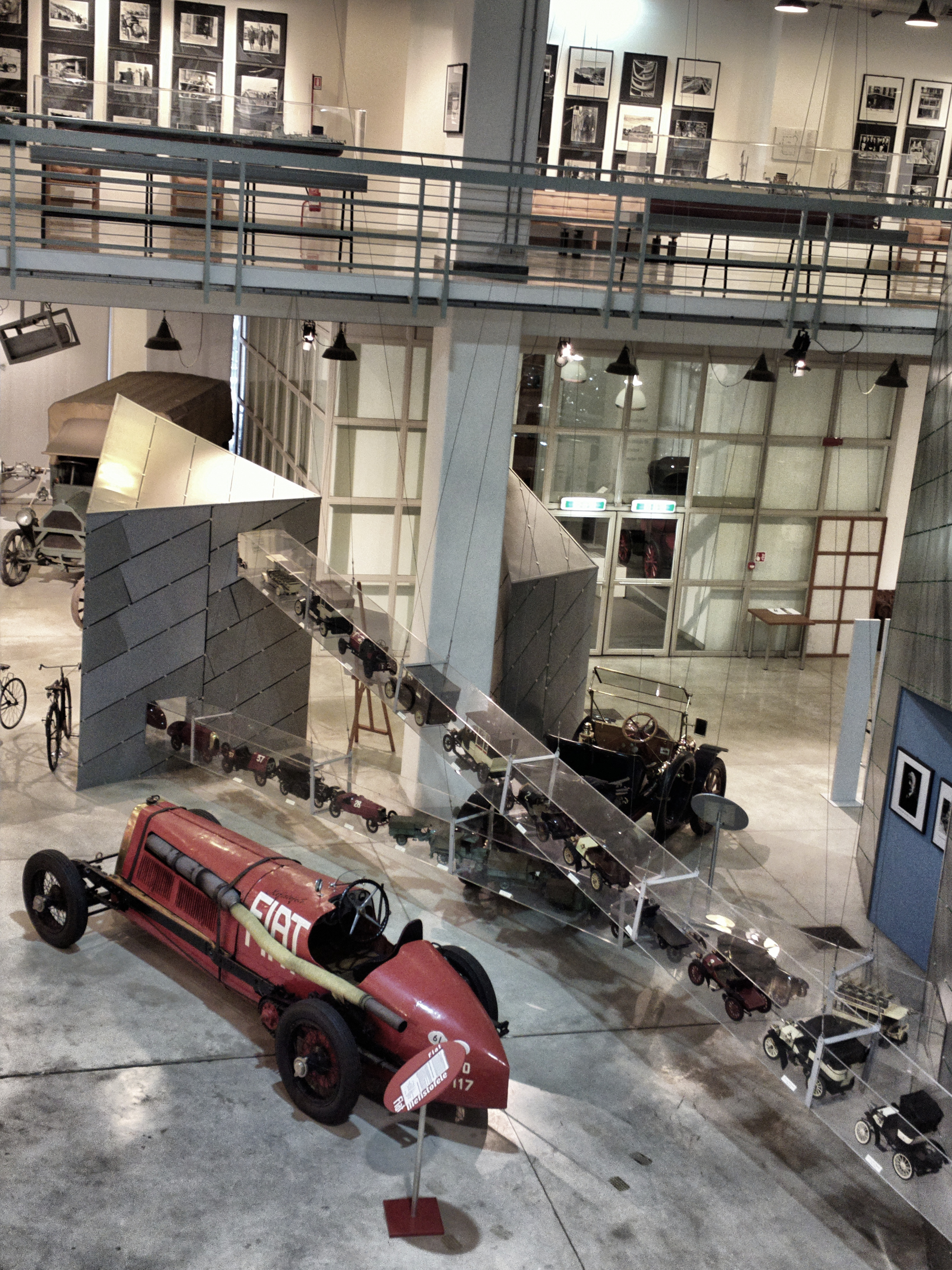 Centro Storico Fiat con Mefistofele in primo piano